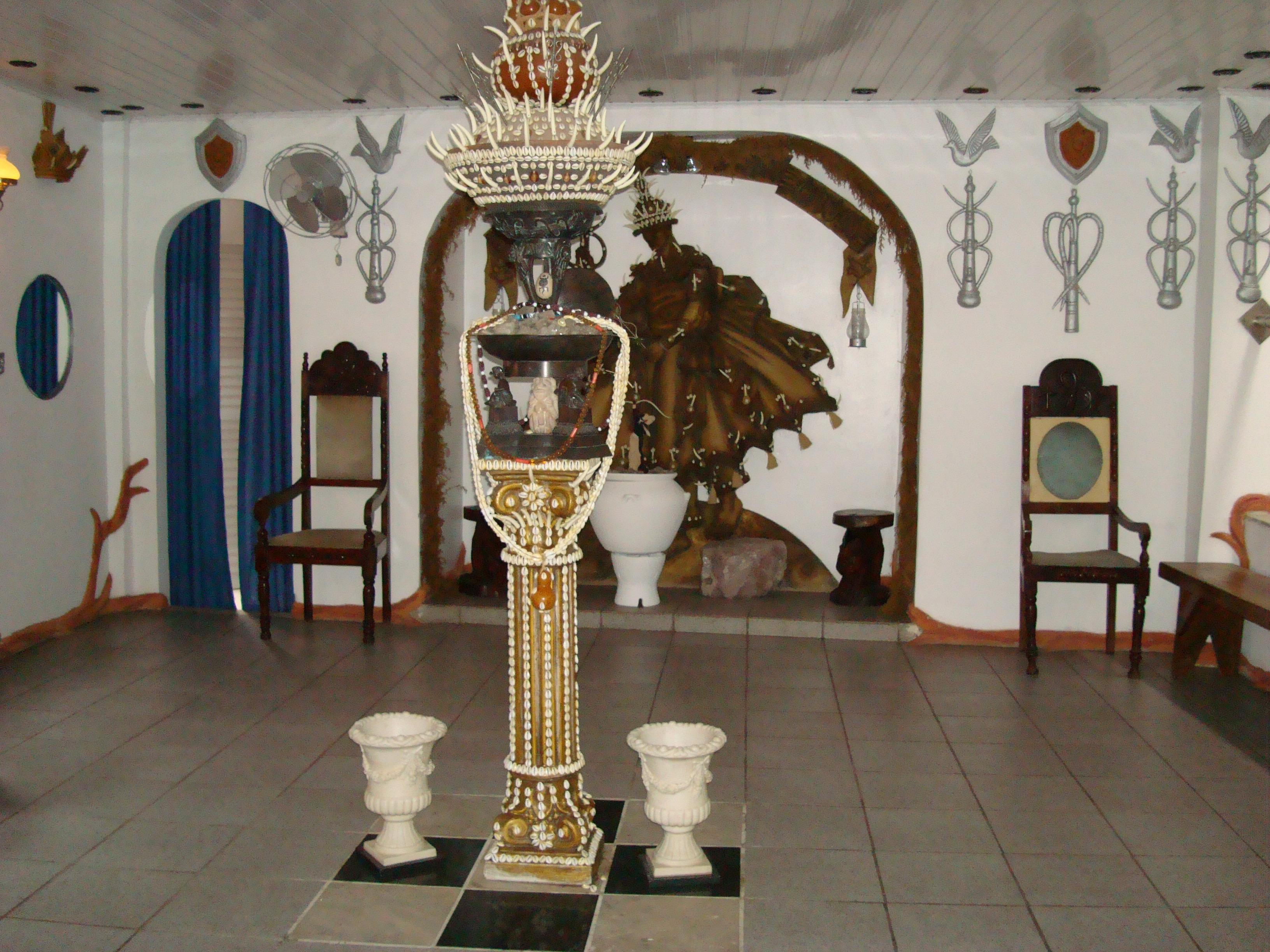 Decoração do Barracão de um Terreiro de Candomblé, Bahia, Brasil